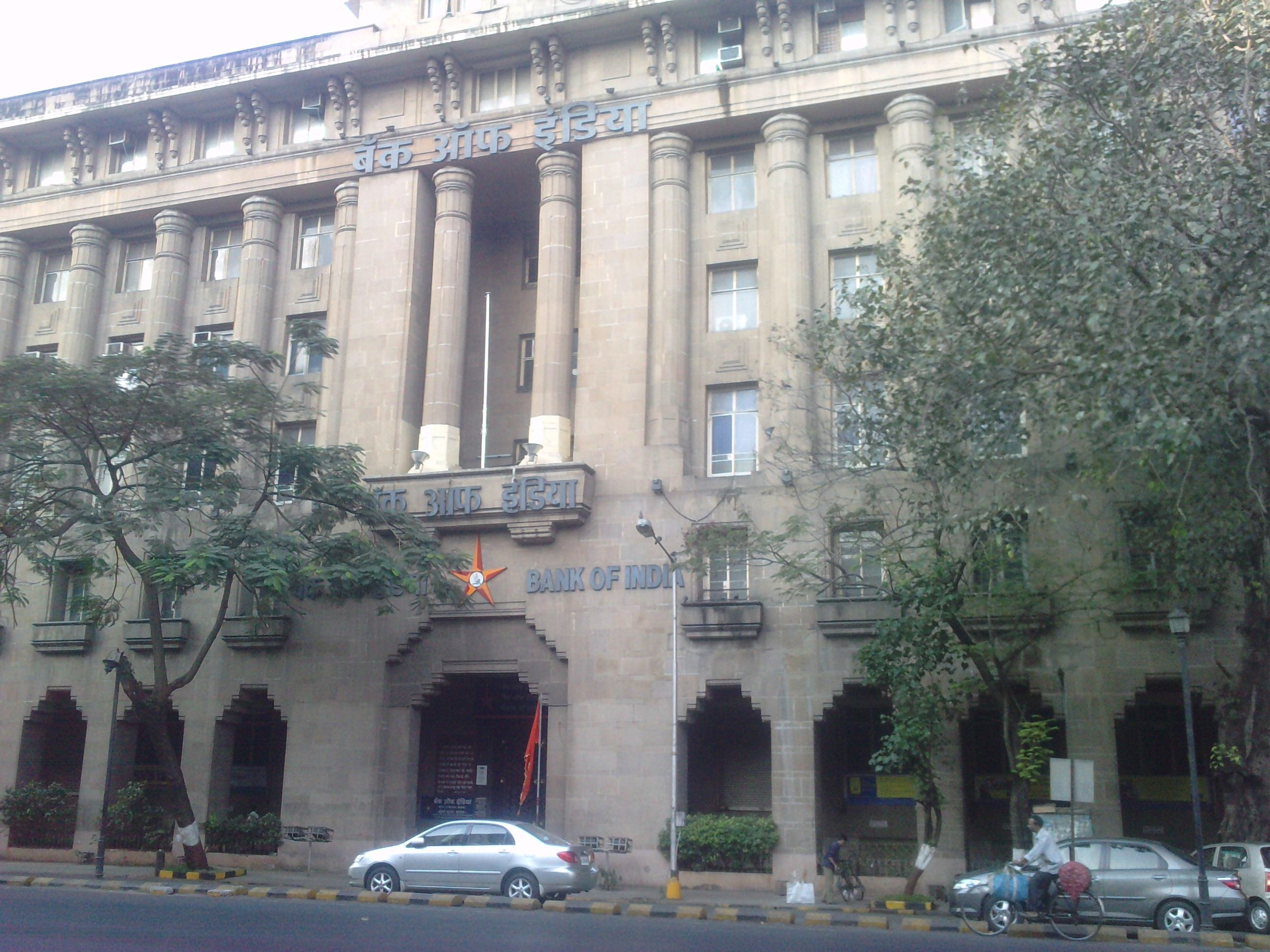 TAKEN DURING WIKIPEDIA TAKES MUMBAI 1 PHOTOWALK